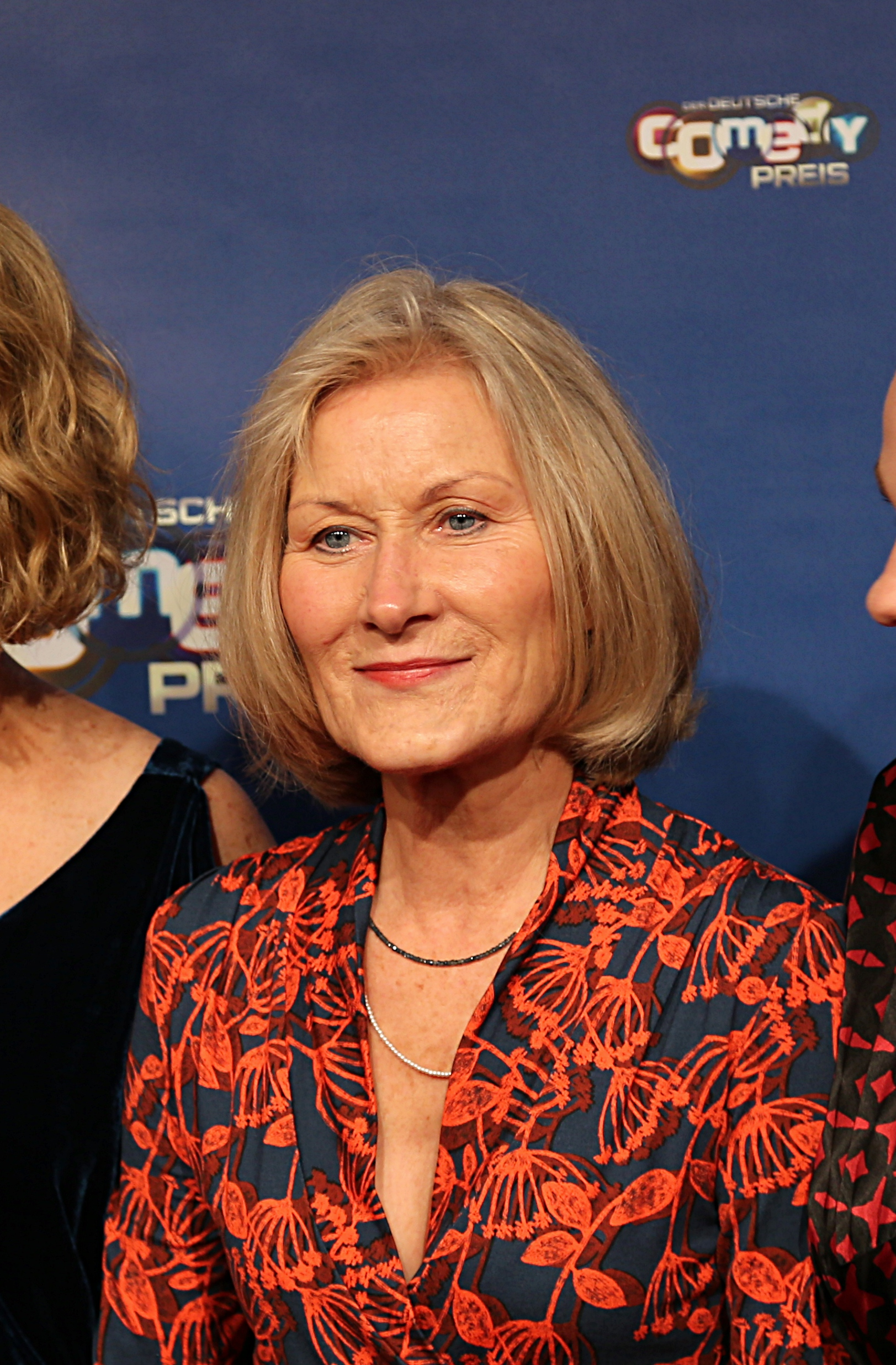 Hedi Kriegeskotte beim Deutschen Comedypreis 2017.